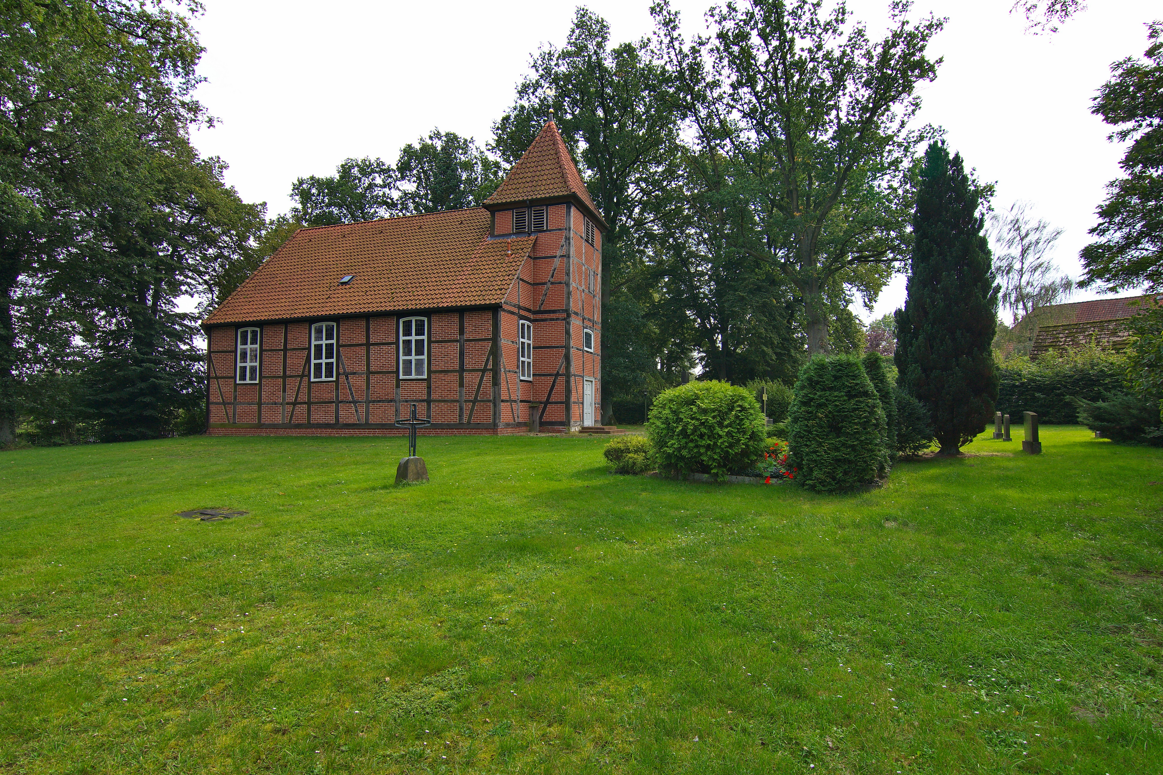 Fachwerkkirche zu Ribrau (Zernien), Niedersachsen, Deutschland im Jahr 2011